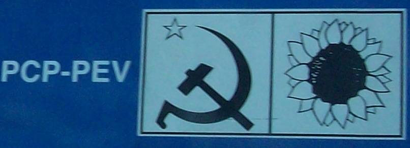 Logotipo da CDU (PCP-PEV) - a partir de cartaz de campanha eleitoral para as eleições legislativas de 2015.